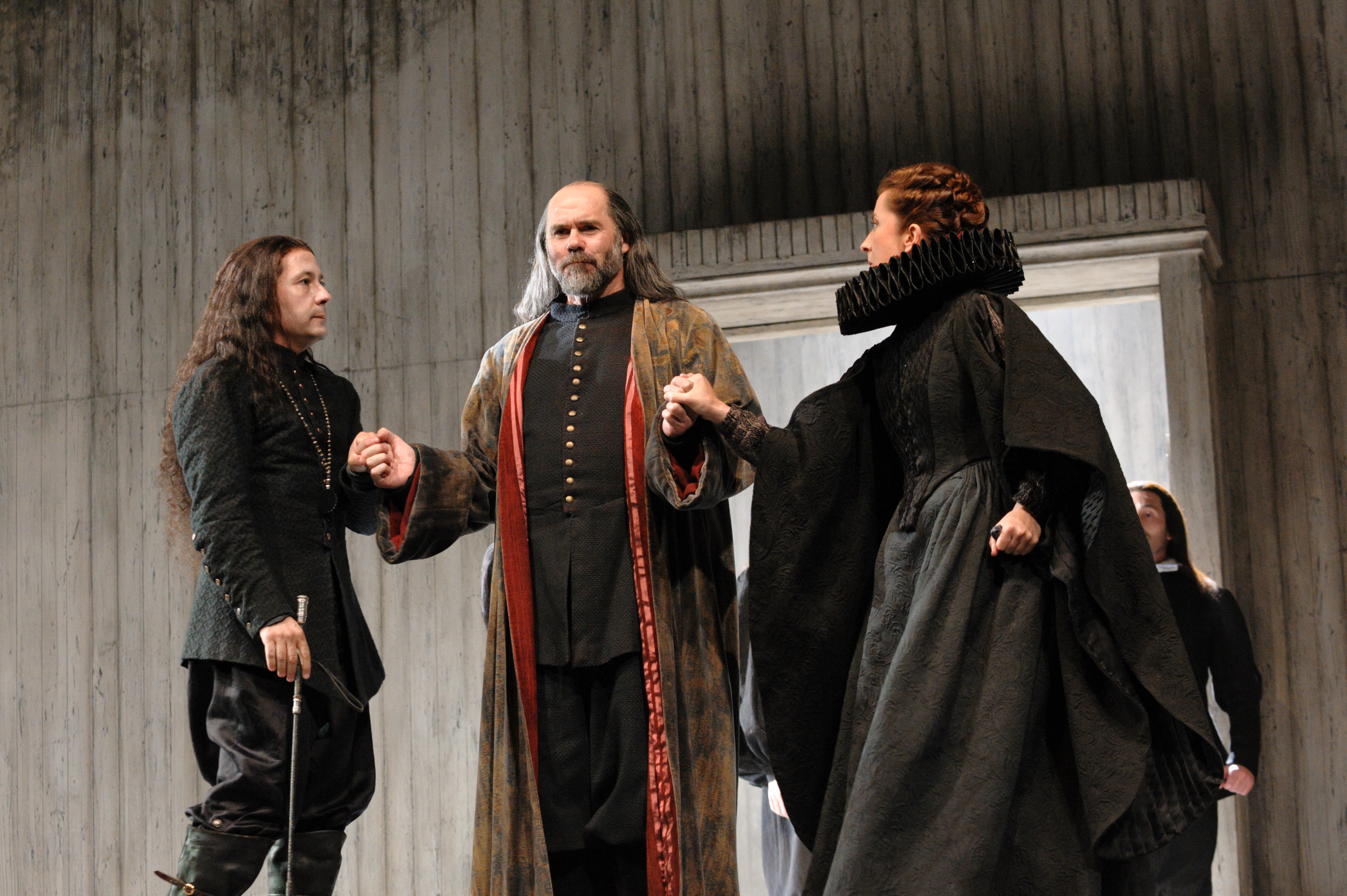 La vida es sueño. 35 edición del Festival de Teatro Clásico de Almagro. Datos de la obra Título: La vida es sueño Autor: Calderón de la Barca Versión: Juan Mayorga Dirección: Helena Pimenta Cía: Compañía Nacional de Teatro Clásico Foto: Guillermo Casas